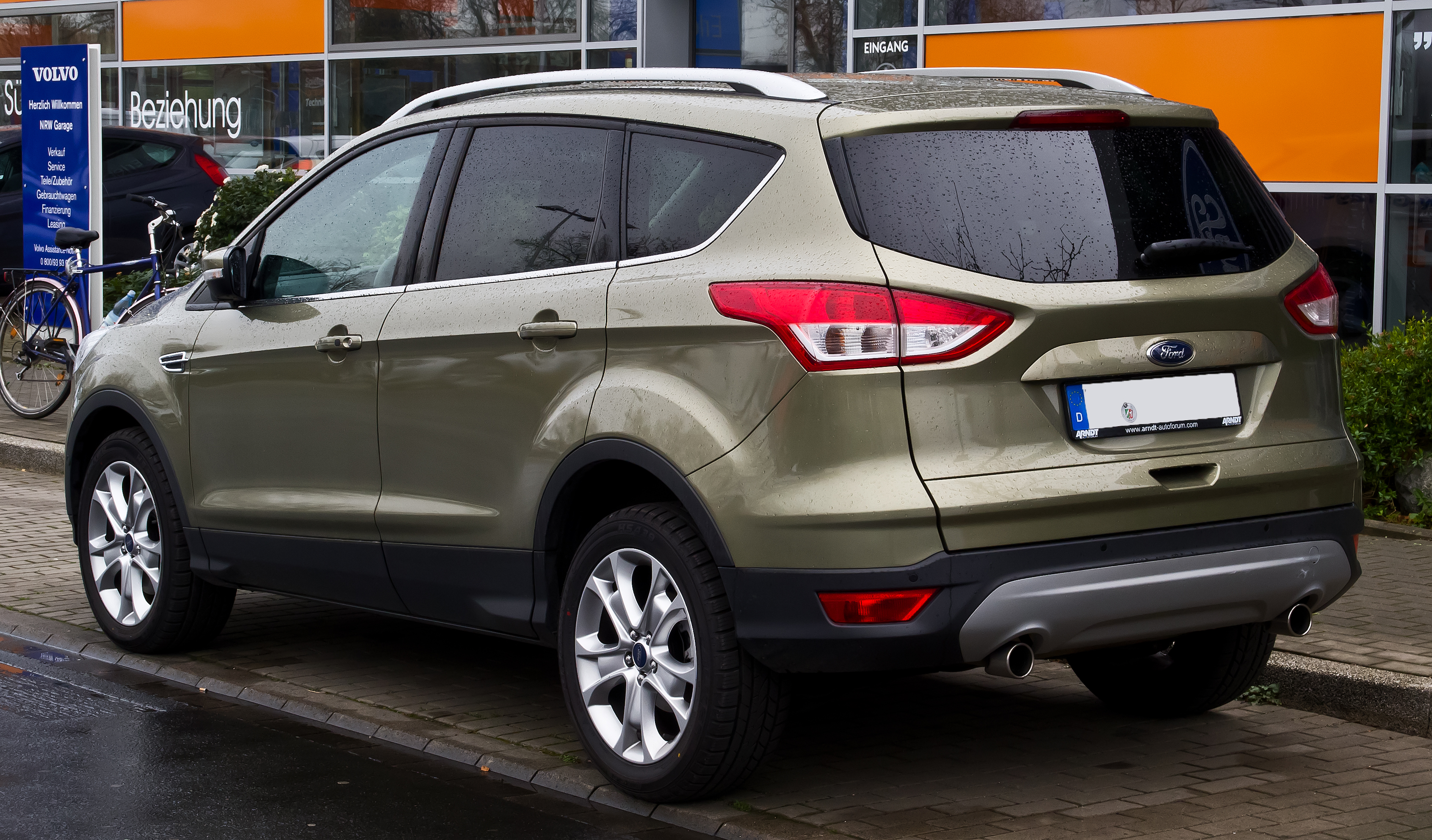 Ford Kuga Titanium (II)